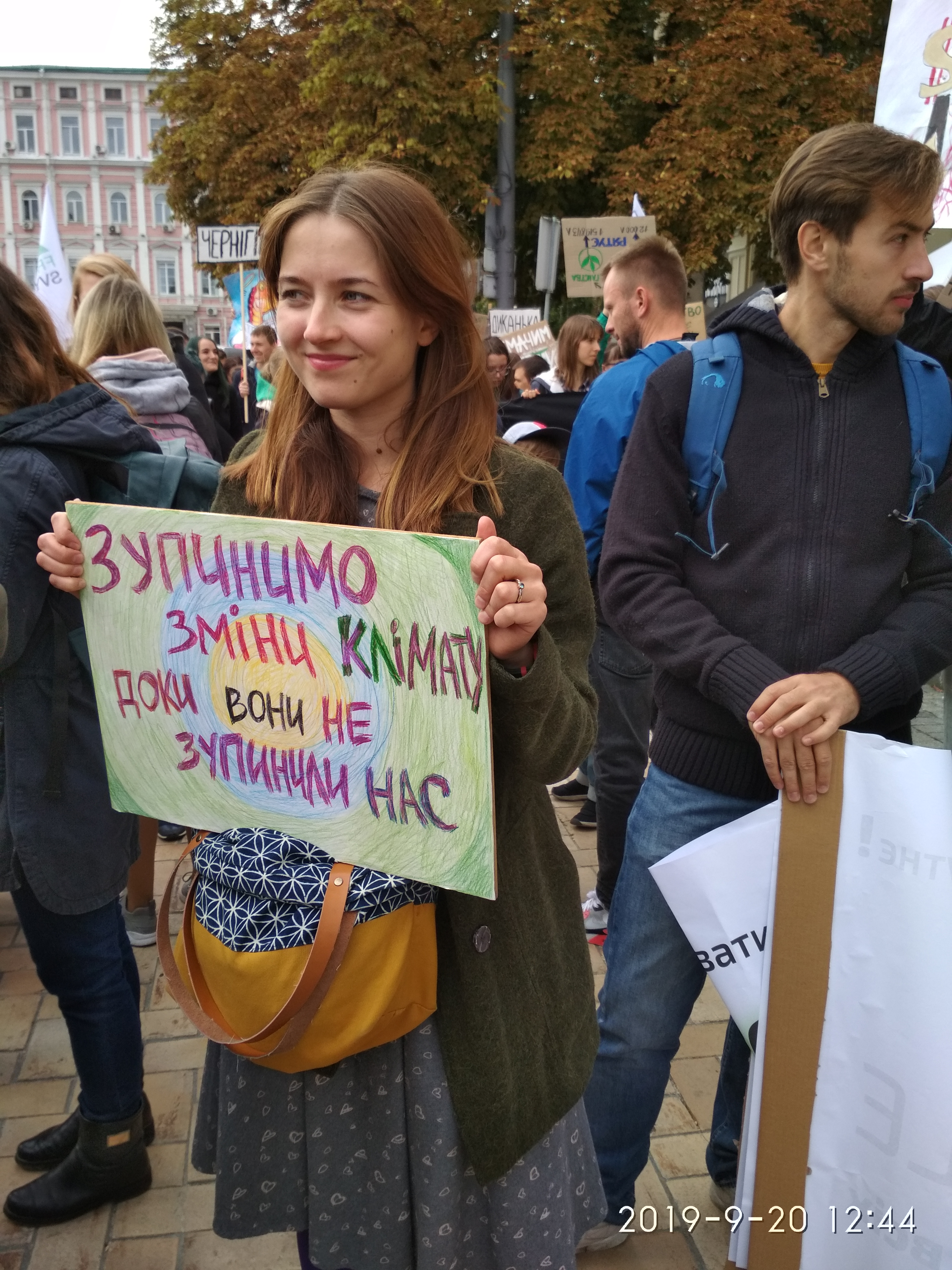 Глобальний кліматичний марш у Києві 20 вересня 2019